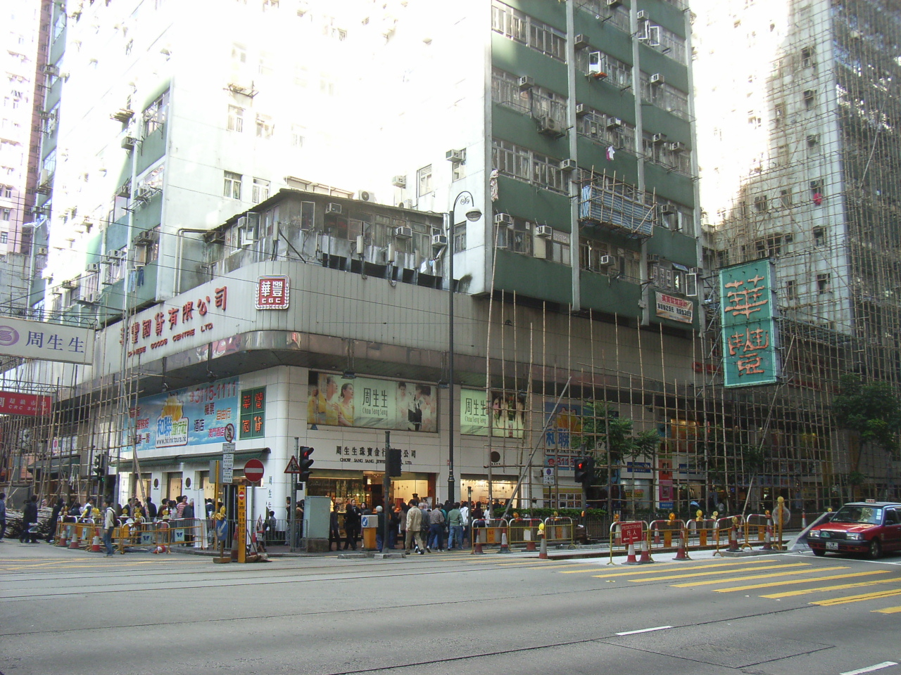 Kiu Kwan Mansion, 395 King's Road, North Point, Hong Kong. Photographer is User:Huang Kong Hing